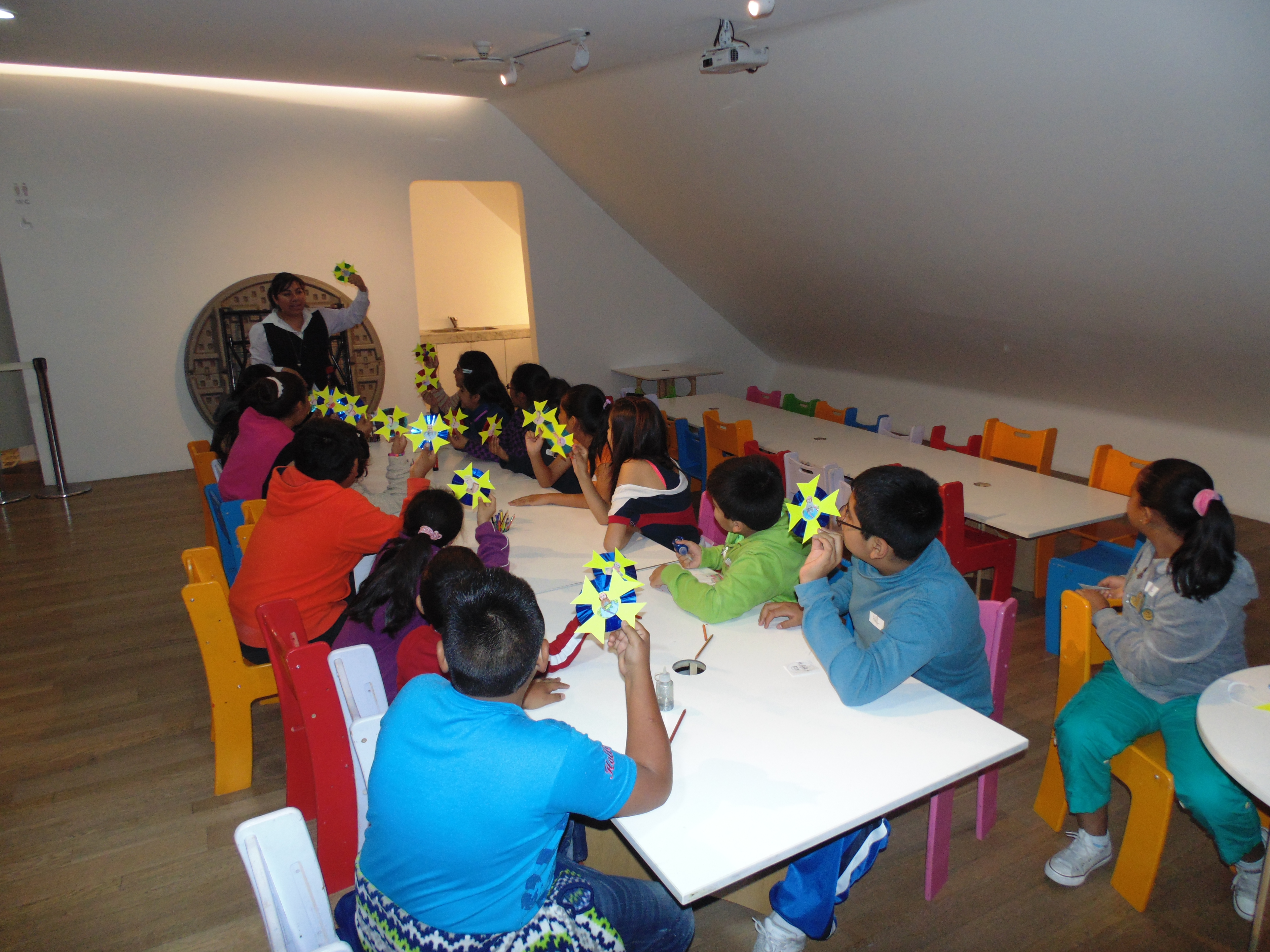 Taller de mediación y creación.